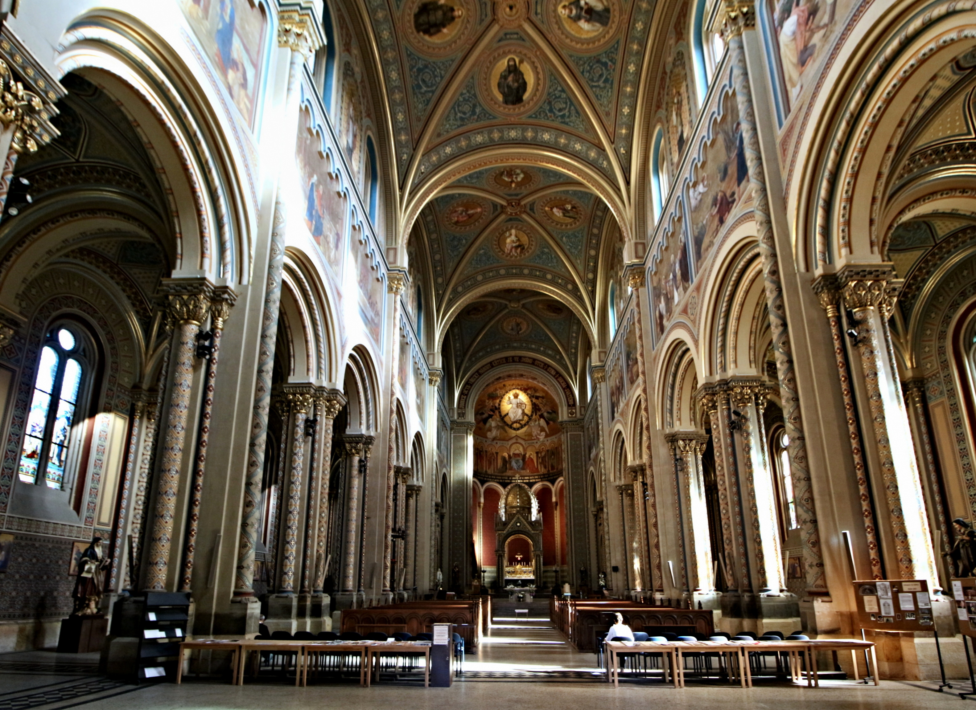 Karlínský kostel svatých Cyrila a Metoděje